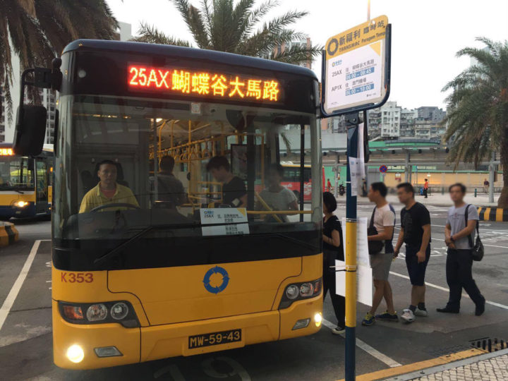 Transmac 25AX